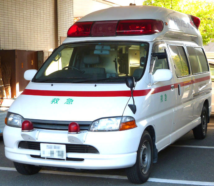 市消防本部から市立病院に転属した救急車。屋根には消防無線のアンテナ、助手席の窓には補助ミラーが残っている。 （大牟田市立病院）